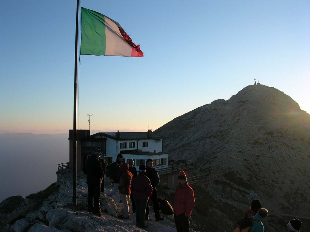 In primo piano il rifugio Fraccaroli con la Cima(2259m) che spicca sul fondo. Foto scattata da sopra la piccola funivia utilizzata per partare il materiale al rifugio.